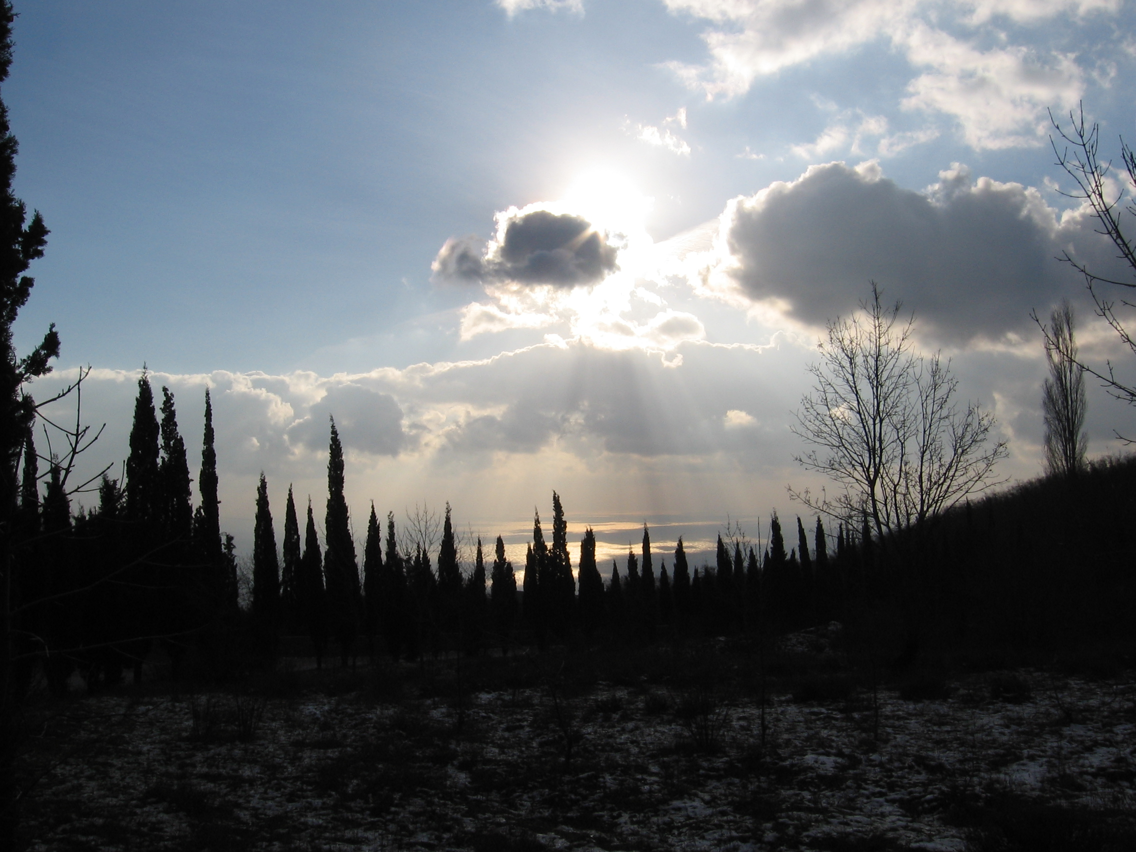 Фото